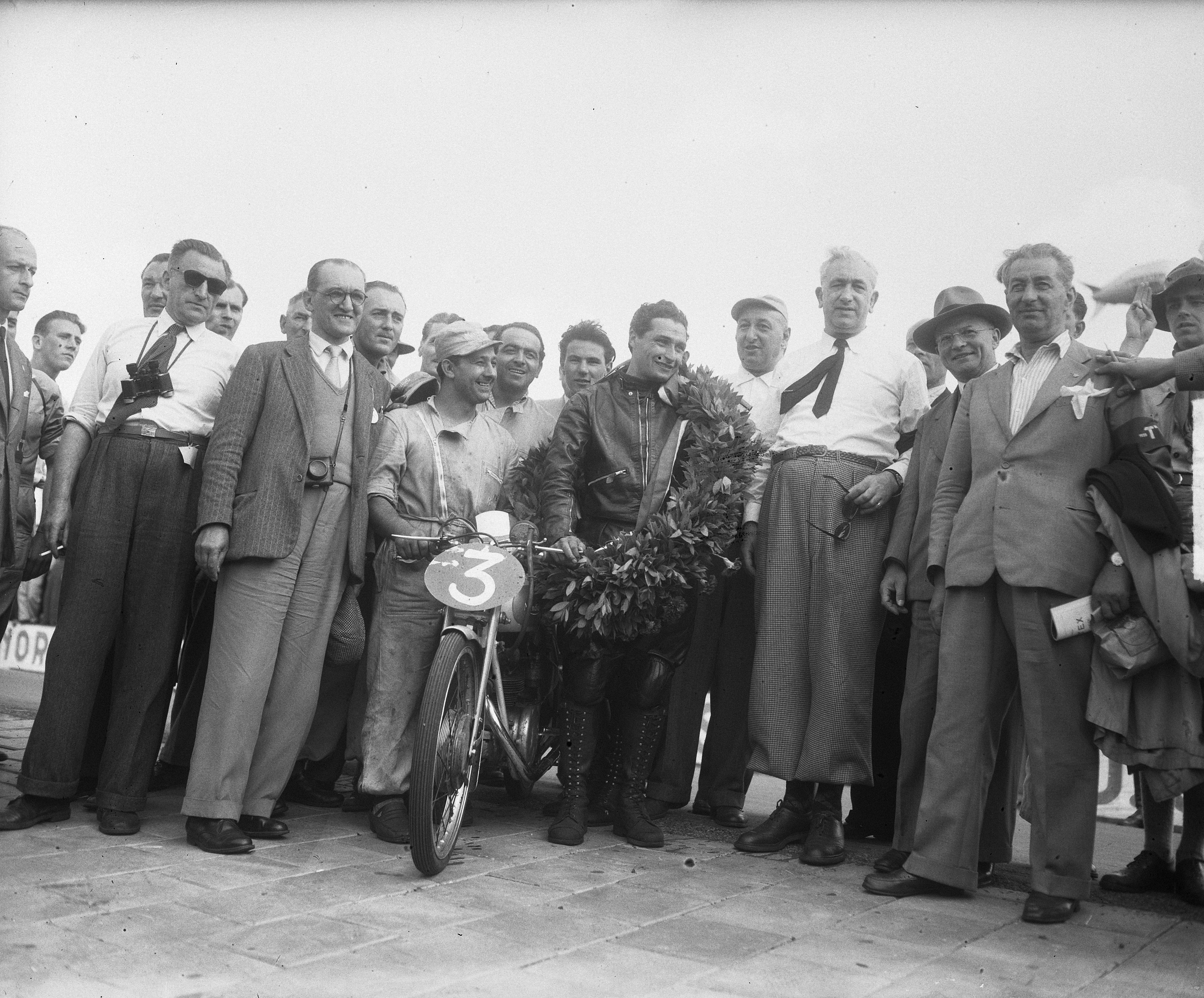 Collectie / Archief : Fotocollectie Anefo Reportage / Serie : [ onbekend ] Beschrijving : T.T.Races Assen. Bruno Ruffo (winnaar 125cc) Datum : 8 juli 1950 Locatie : Assen Trefwoorden : motorsport, sport Persoonsnaam : Ruffo, Bruno Fotograaf : Winterbergen, […] / Anefo Auteursrechthebbende : Nationaal Archief Materiaalsoort : Glasnegatief Nummer archiefinventaris : bekijk toegang 2.24.01.09 Bestanddeelnummer : 904-0668